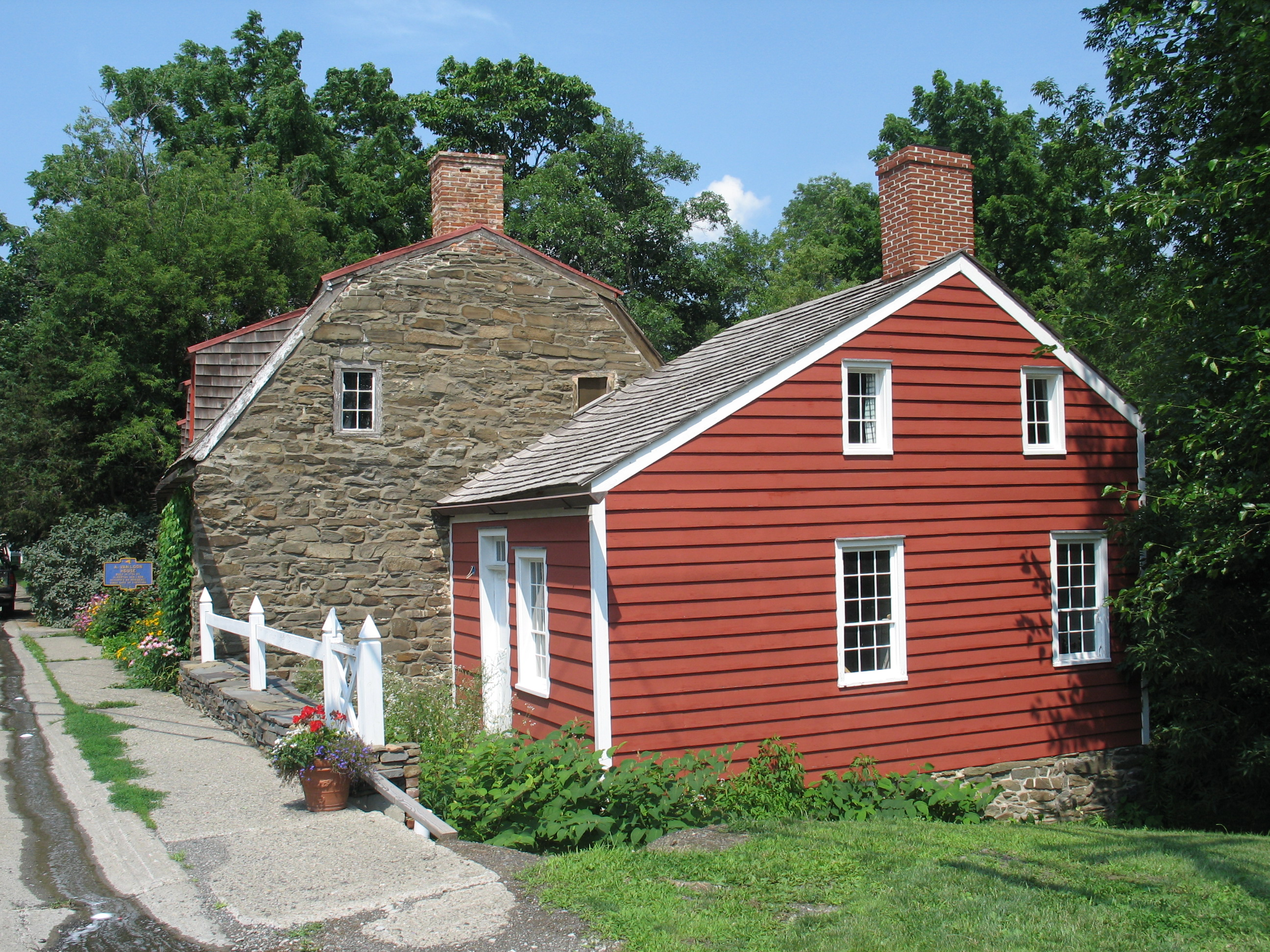 Huis van Albertus van Loon Albertus Van Loon House